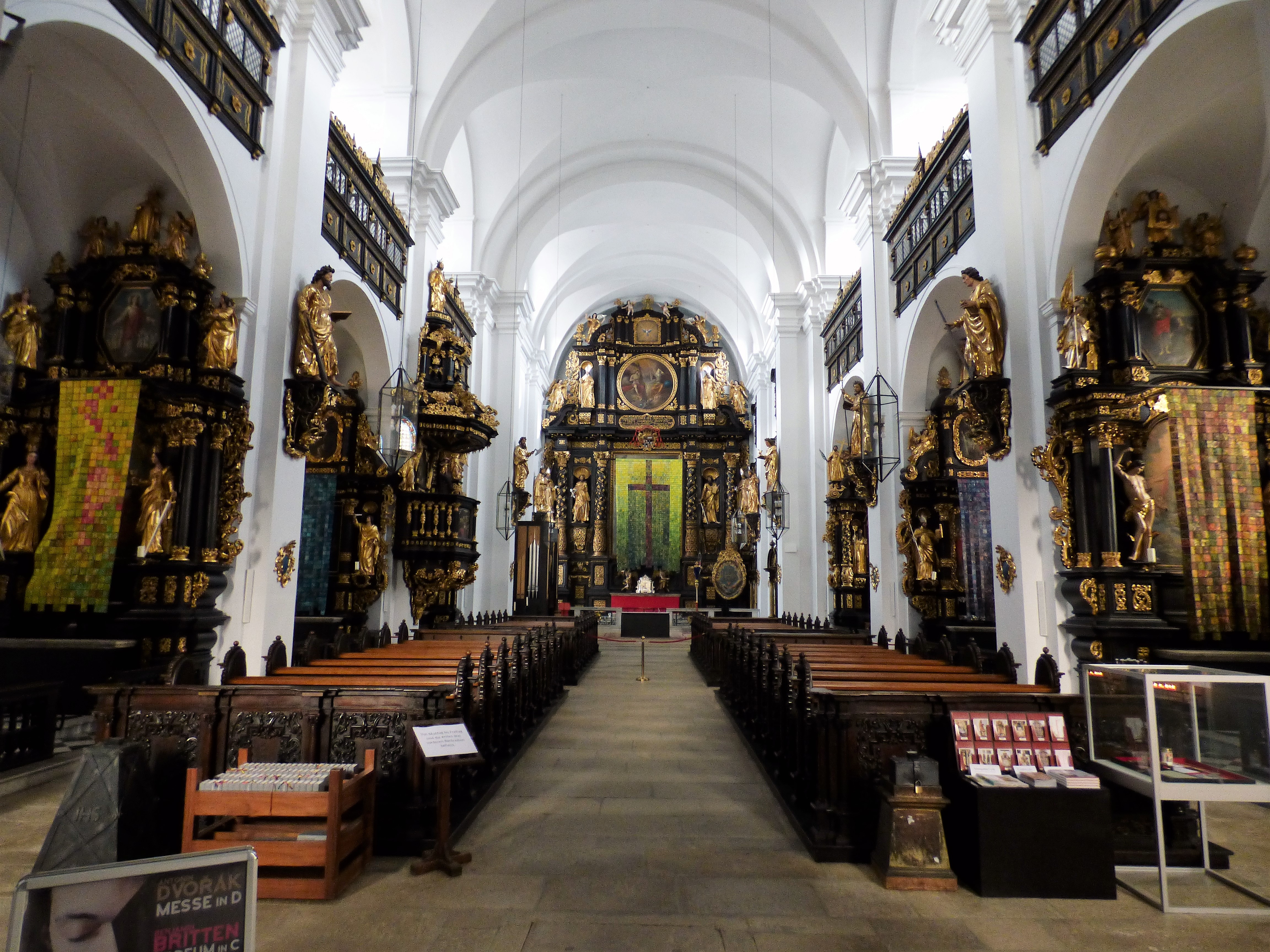 Kirche St. Xaver, Leoben: innen